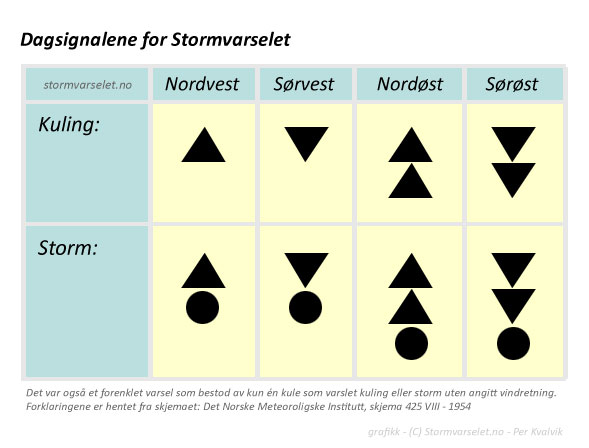 Dagsignalene til Stormvarselet i Kristiansund.